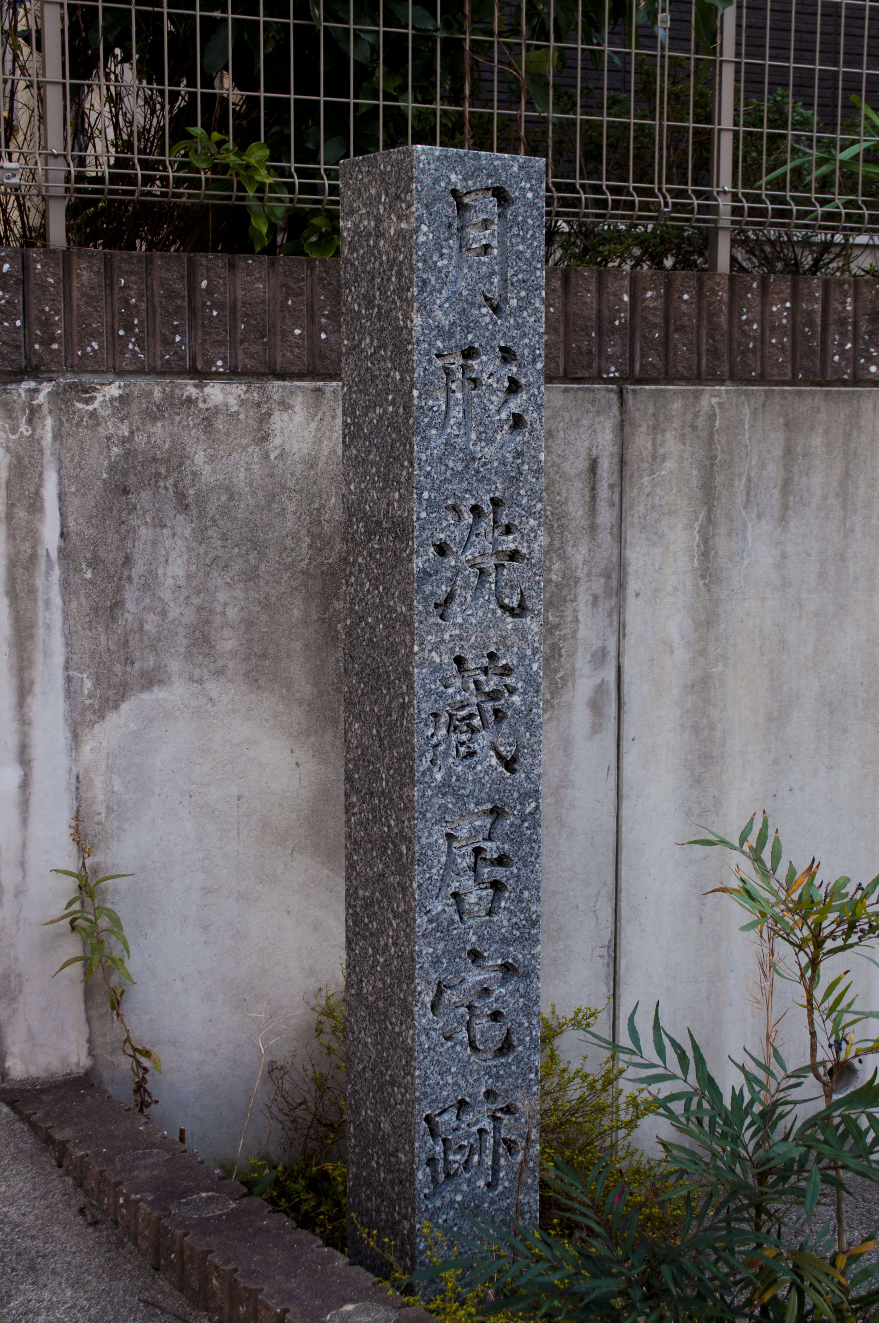 月形洗蔵の居宅跡。福岡県福岡市中央区赤坂3丁目にある。